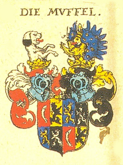 Wappen der Nürnberger Patrizierfamilie Muffel von Eschenau